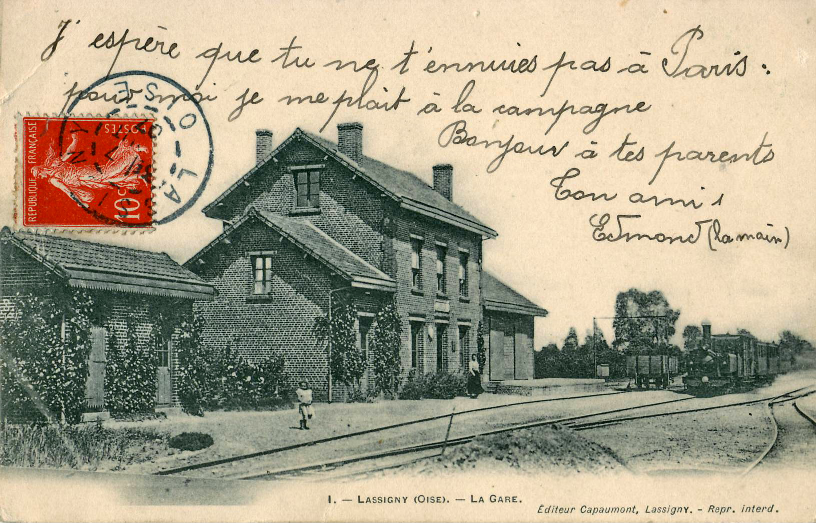 Carte postale ancienne éditée par Capaumont à Lassigny :LASSIGNY - La Gare